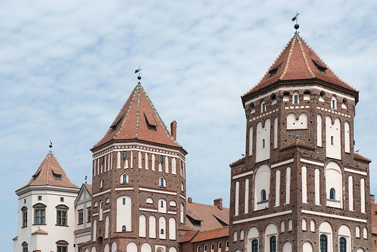 Беларуская (тарашкевіца): Замкавы комплекс «Мір». Будынкі, збудаваньні, пляніровачная структура, ляндшафтныя кампазыцыі, рэшткі земляных абарончых збудаваньняў, элемэнты абвадненьня. г.п. Мір